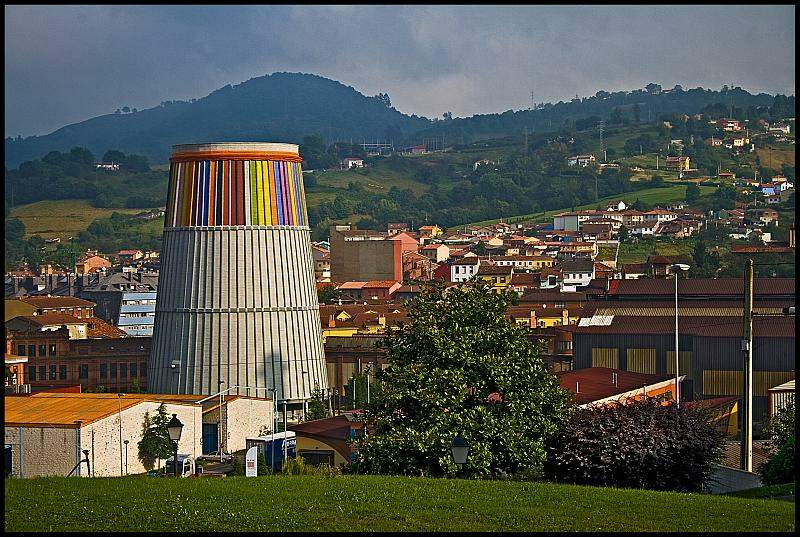 Museo de la Siderurgia de Asturias (MUSI), en La Felguera de Langreo (Asturias)